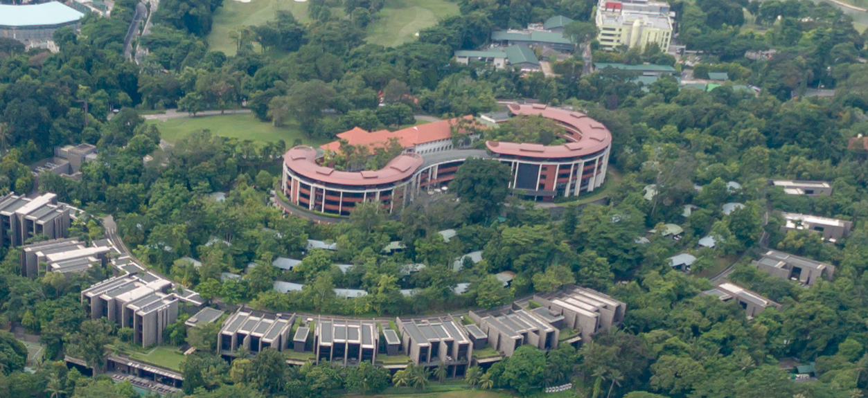 Palawan Beach Sentosa Singapore Singapur Singapore Luftbild aerial